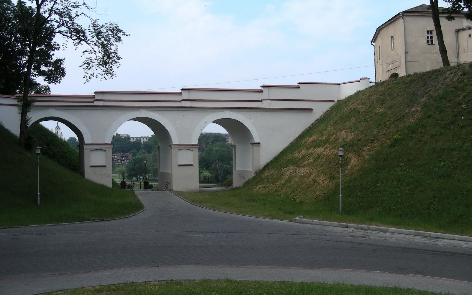 BELARUS / GRODNO (Гродна). Castle bridge.